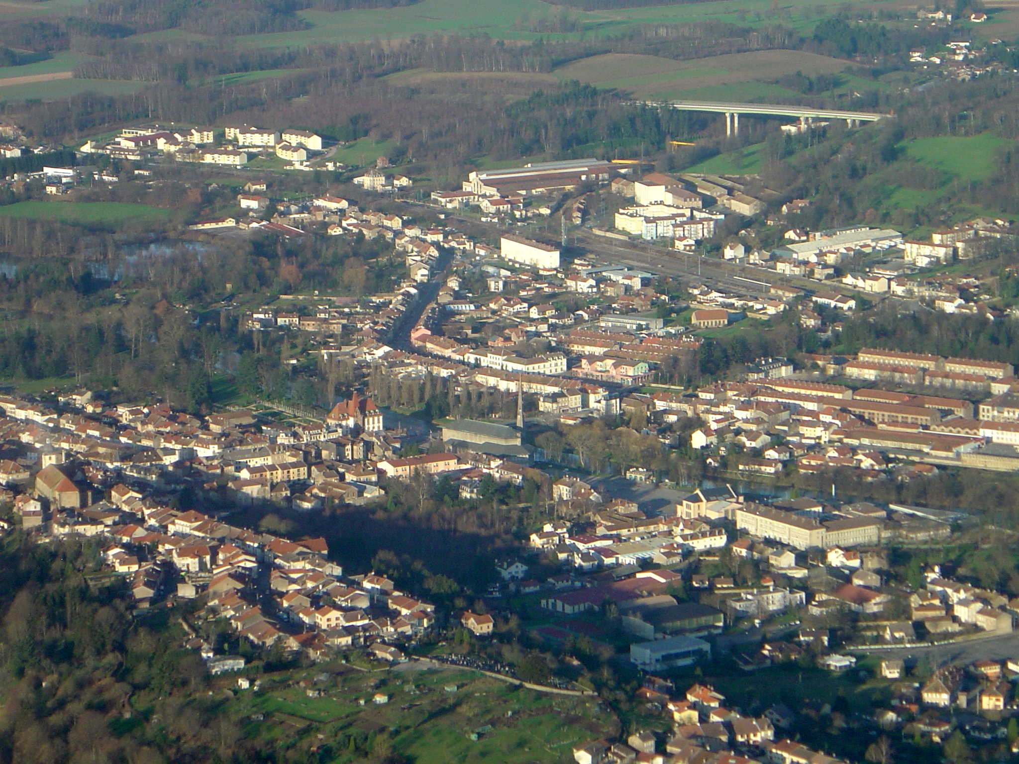 Vue aérienne de Baccarat (France) réalisée le 14 janvier 2007 par Sébastien Beaujard.